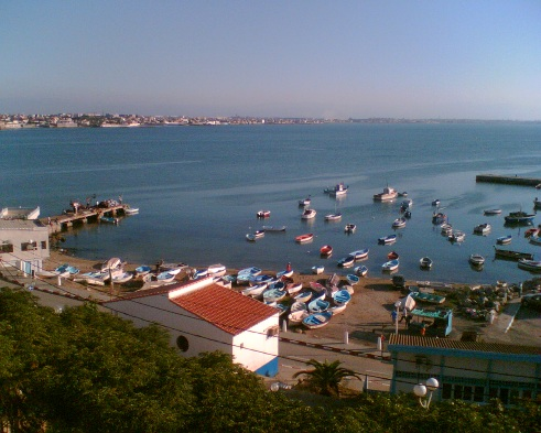 Vue du port de Tamentfoust